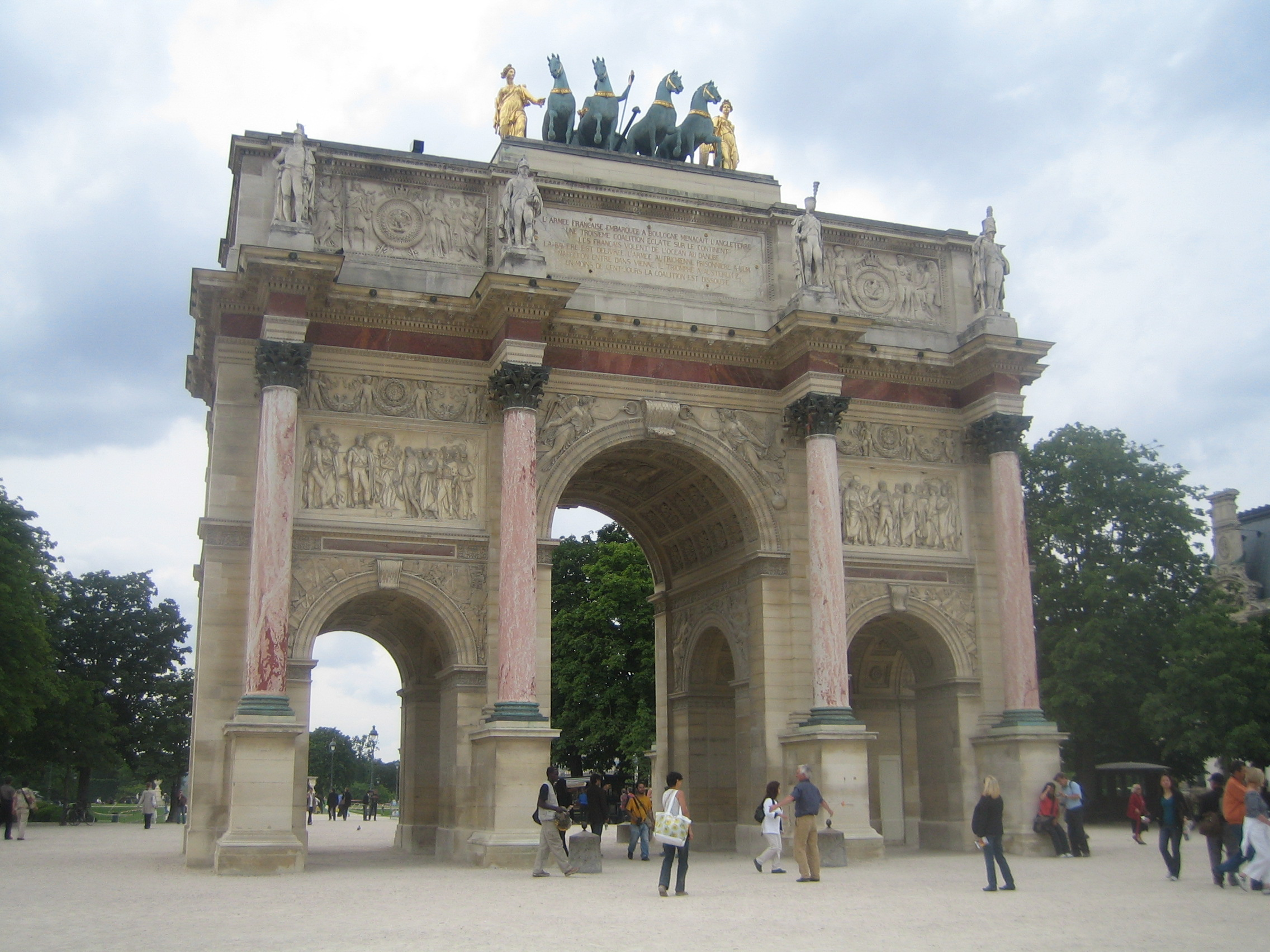 L'arc de triomphe du Caroussel, façade est, à Paris.